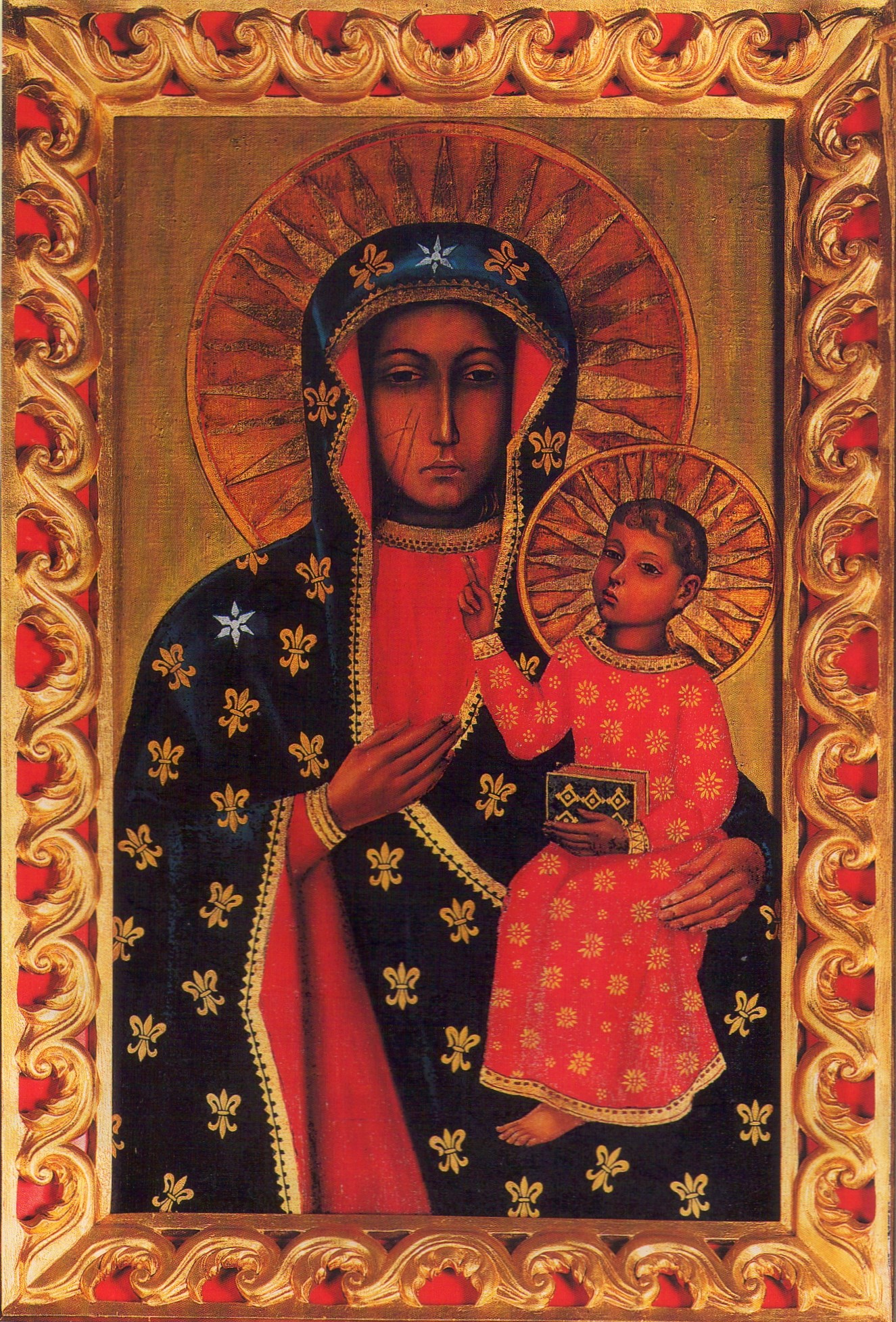 Obraz w ołtarzu głównym